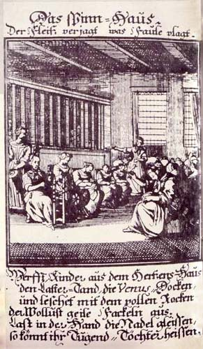 nschrift: Der Fleiß verjagt, was Faule plagt. Werft Kinder aus dem Herzens-Haus, den Laster-Tand, die Venus Docken, und löschet mit dem vollen Rocken der Wollust geile Fackeln aus. Laßt in der Hand die Nadel gleißen, so könnt ihr Tugend-Töchter heissen.